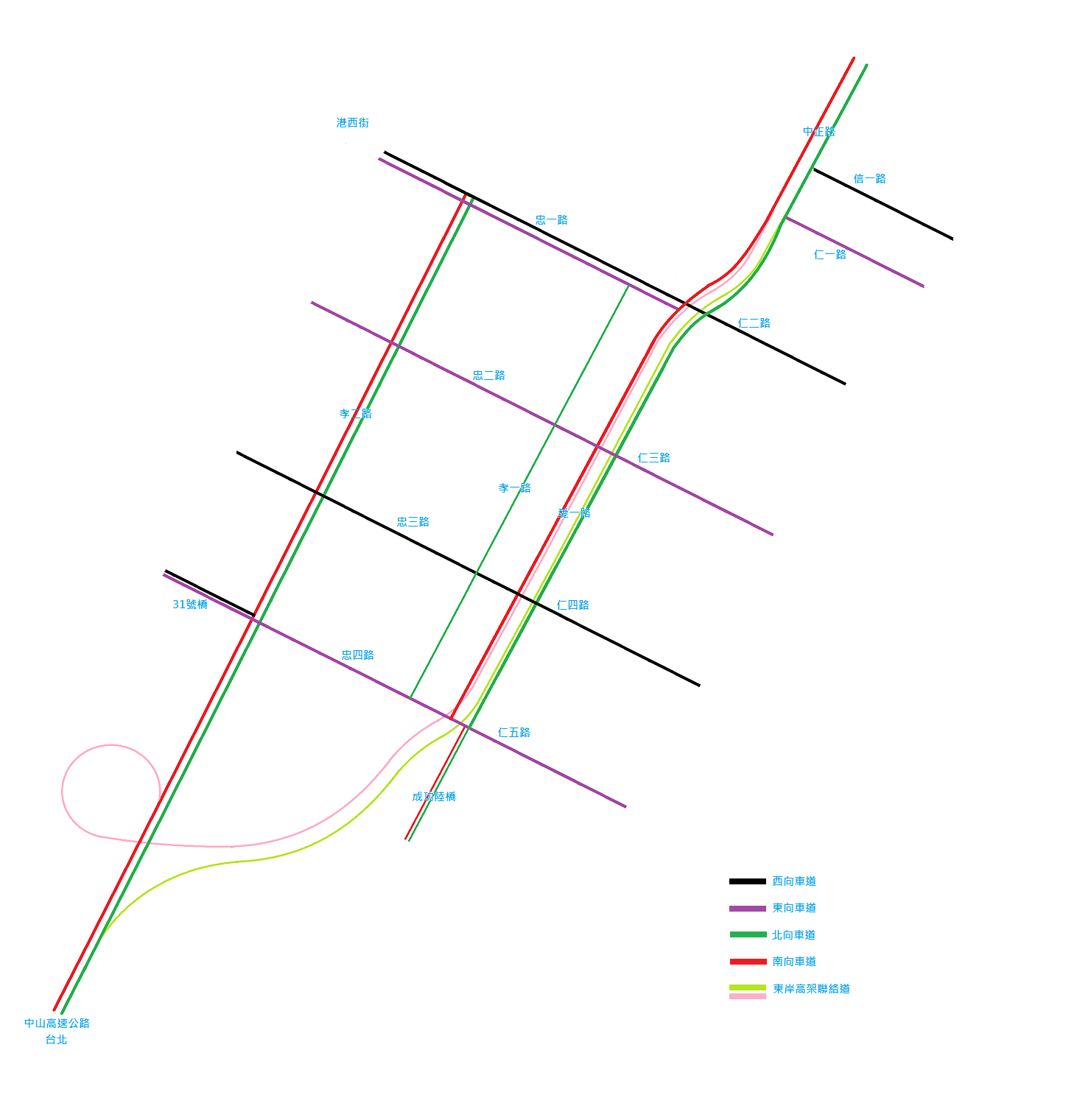 中文（台灣）: 基隆港東岸高架聯絡道示意圖